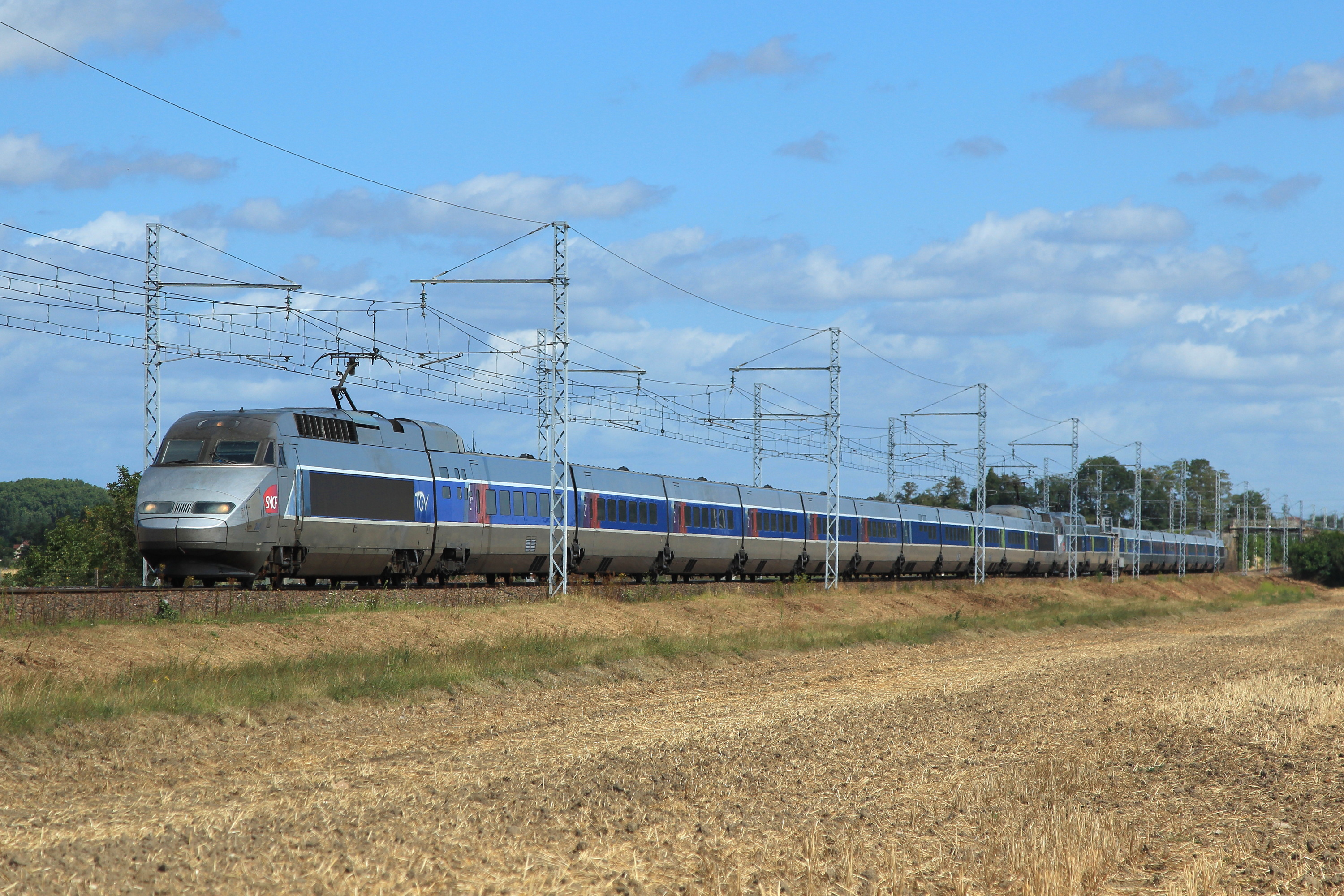 Une UM de TGV Atlantique assurant un TGV Paris - Bordeaux et au-delà, vu sur la commune de Dangé-Saint-Romain.